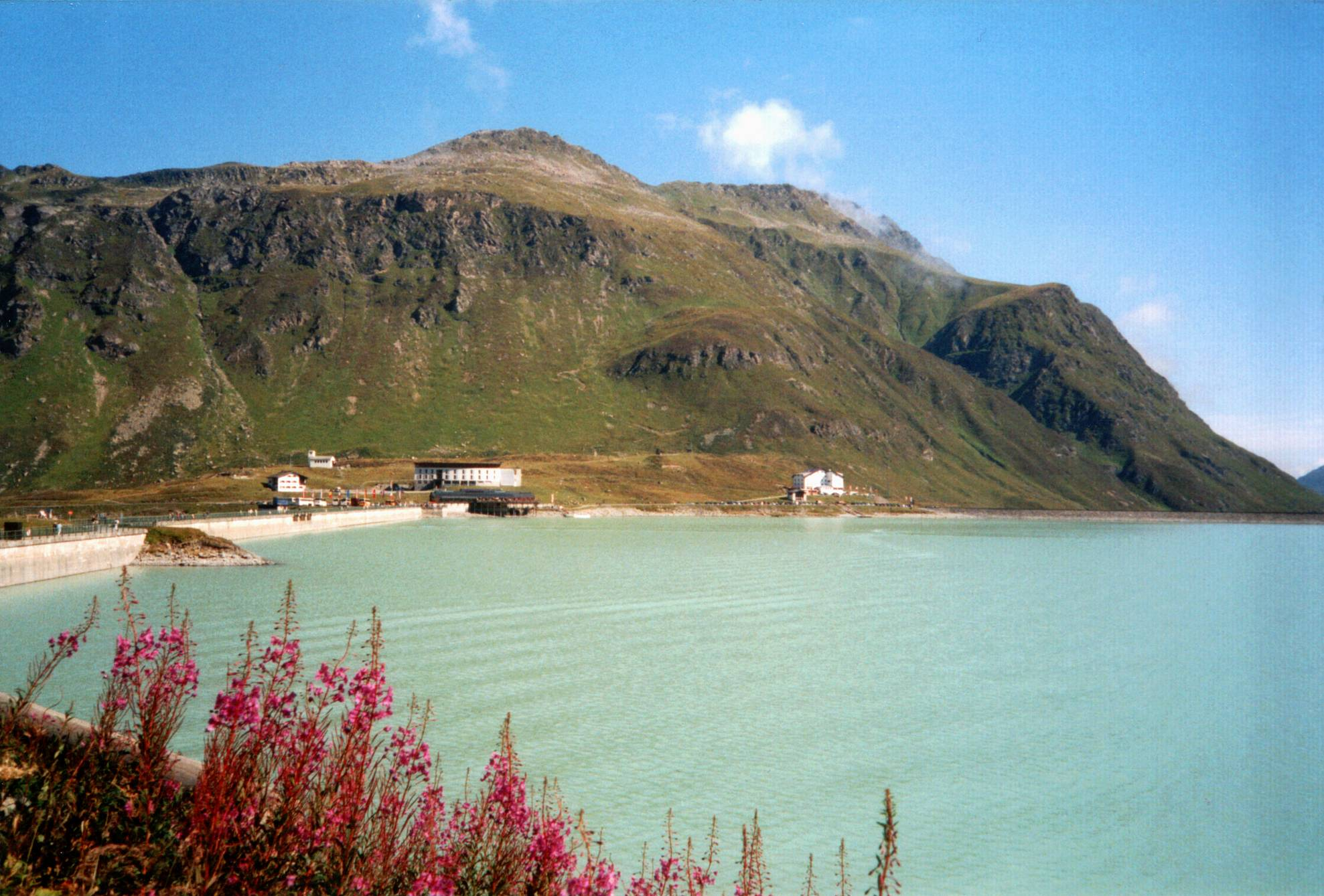 Silvrettastausee Date: August 2002 Author: Hejkal